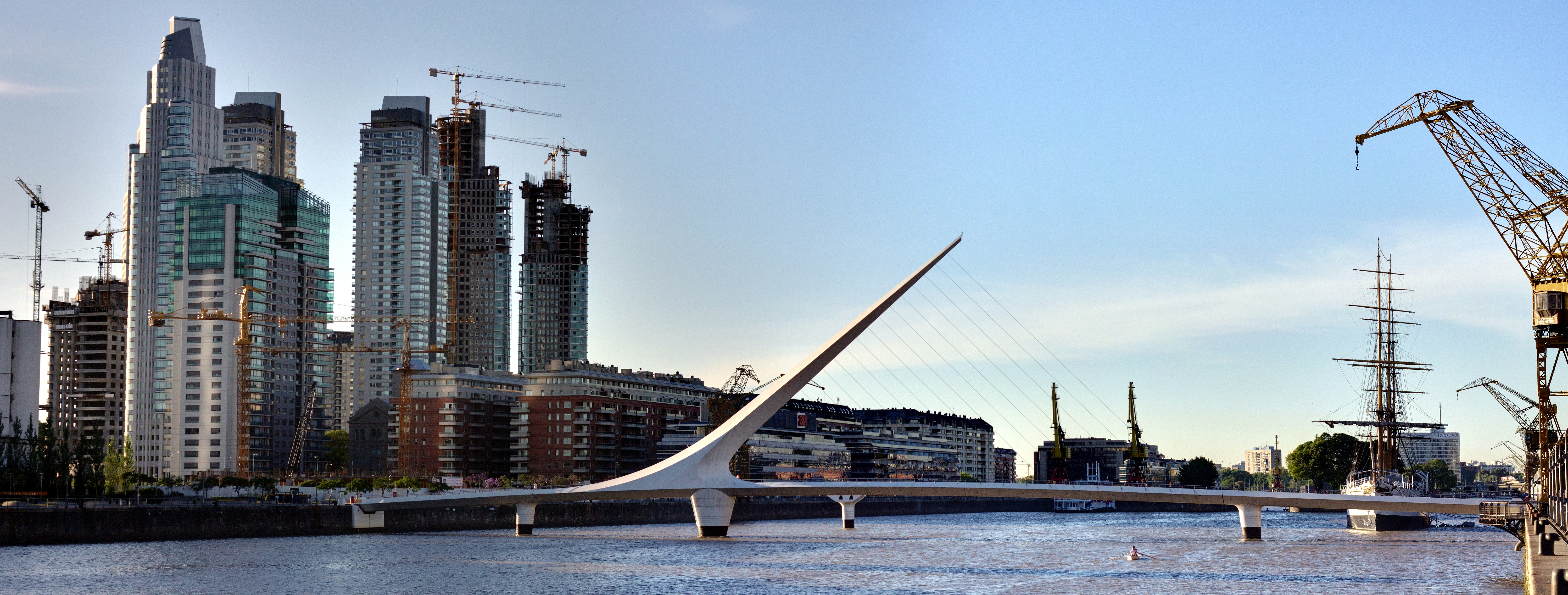 Puente de la Mujer, Puerto Madero, Buenos Aires, Argentina